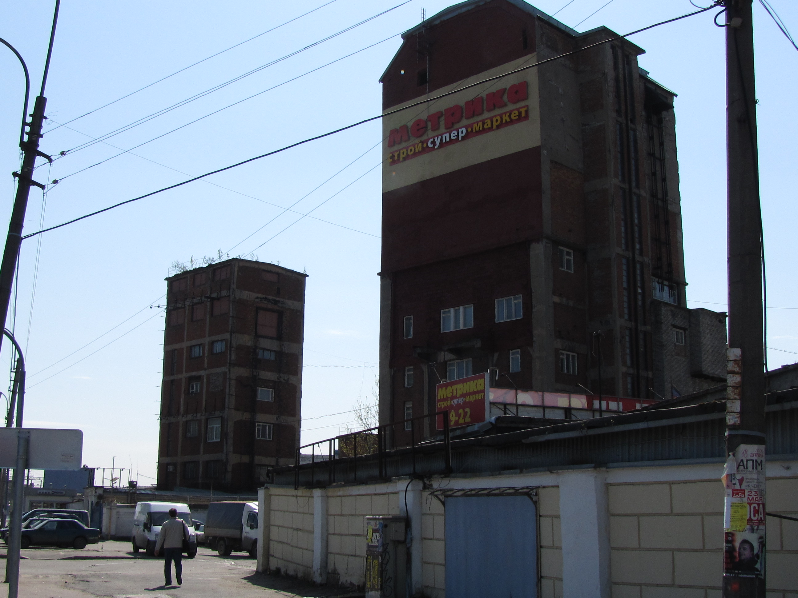 Набережная обводного канала